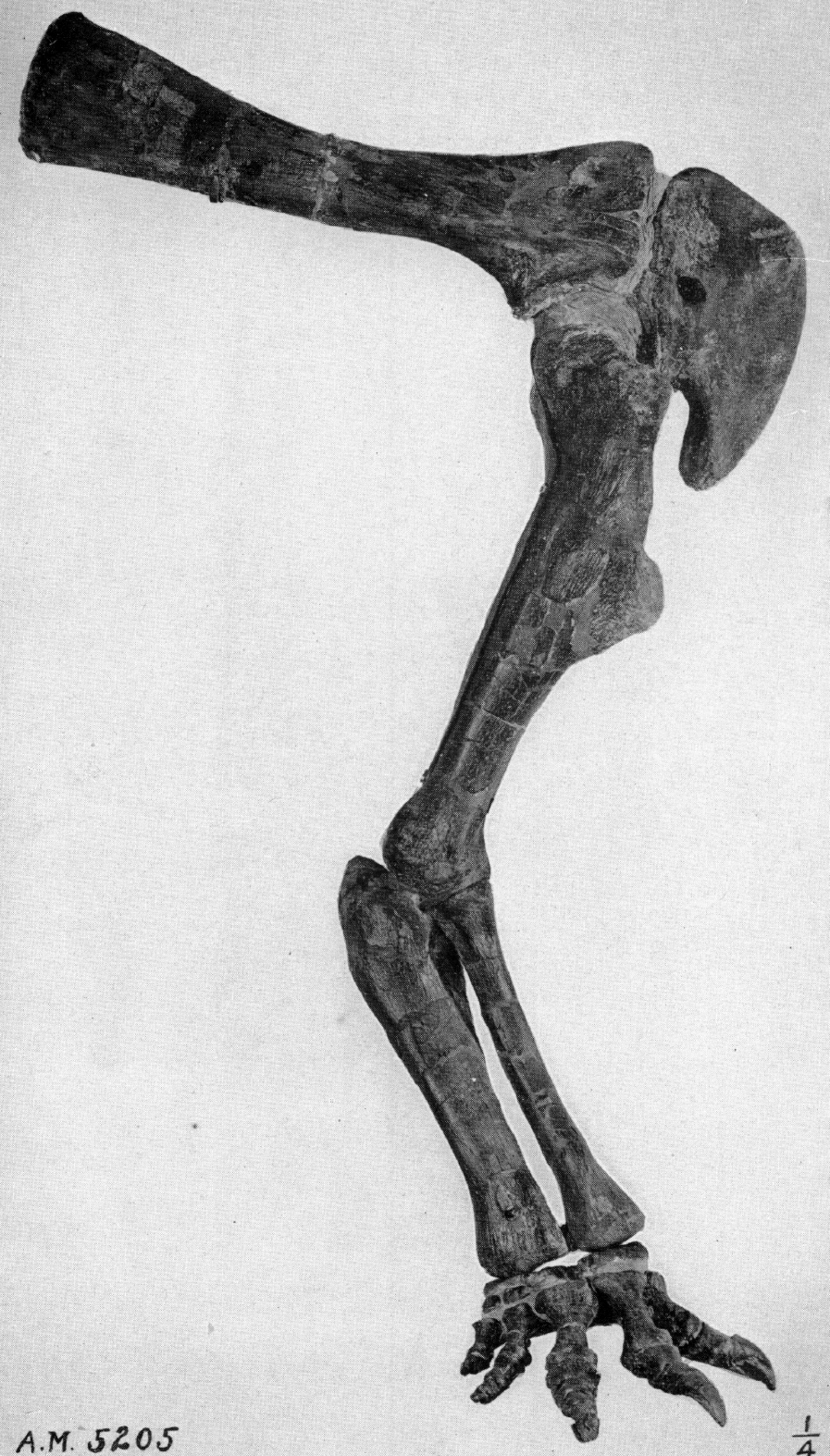 Leptoceratops gracilis forelimb.